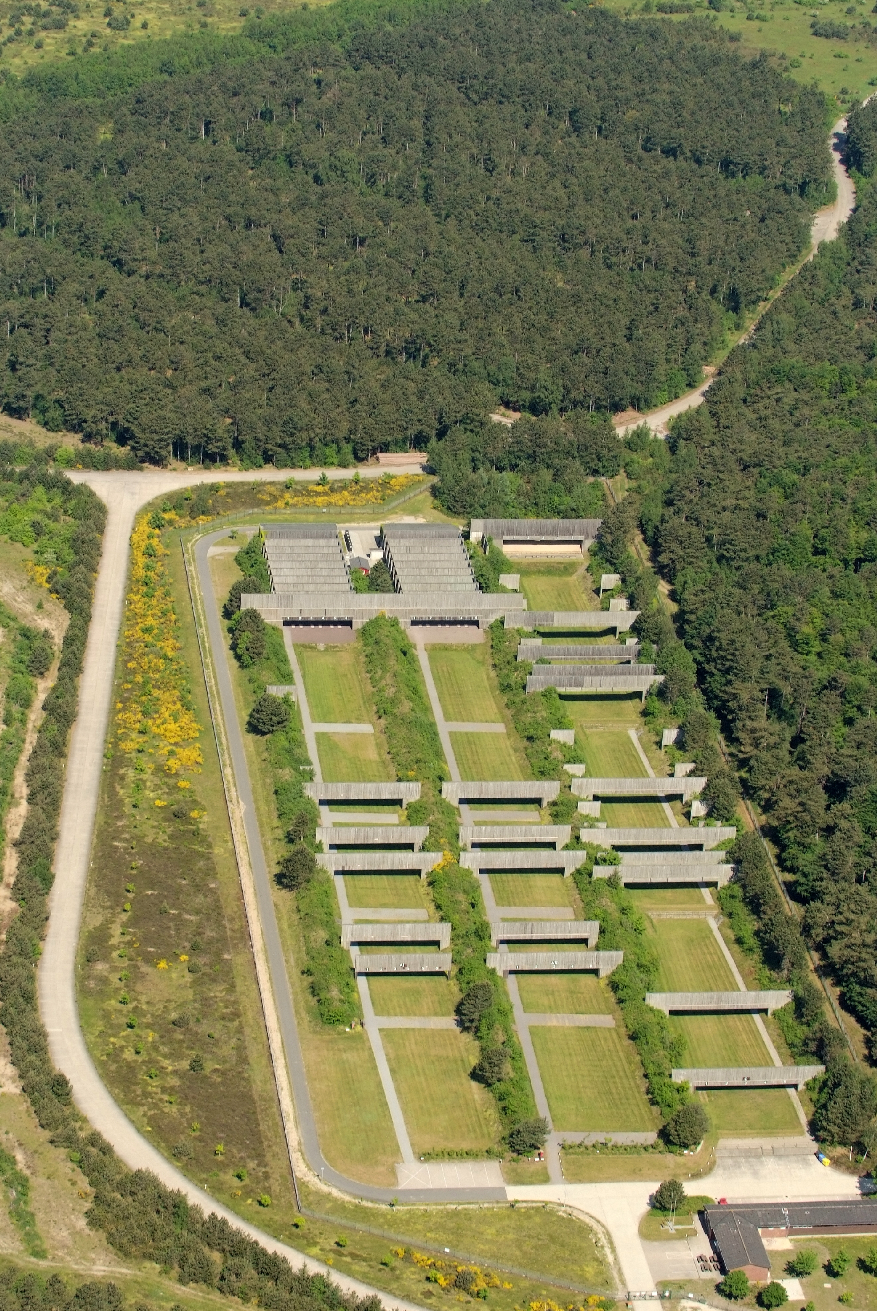 Schießstand in Altenwalde Fotoflug vom Flugplatz Nordholz-Spieka über Cuxhaven und Wilhelmshaven